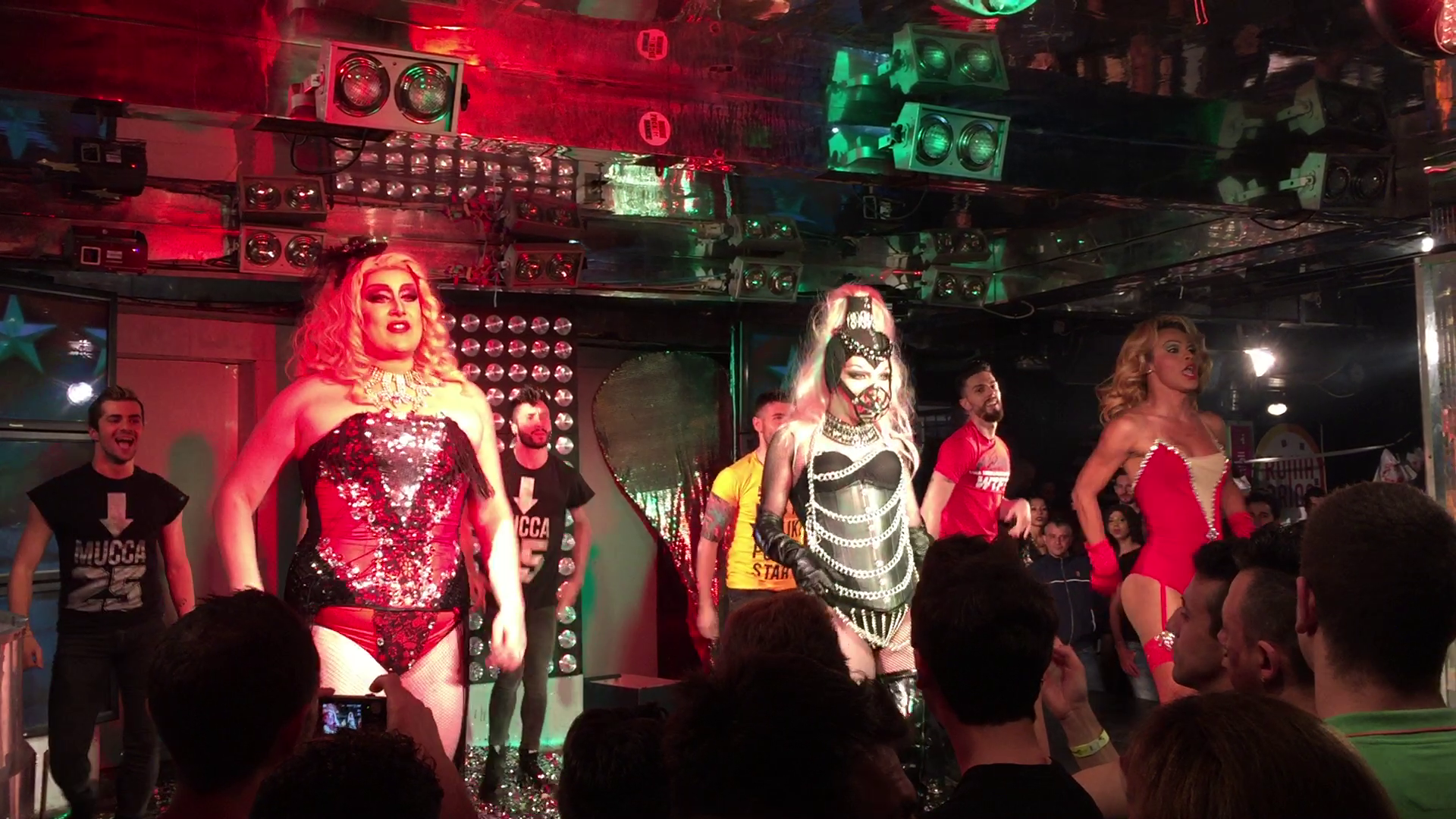 Drag queen e dancer performano la sigla al piano terra del Qube